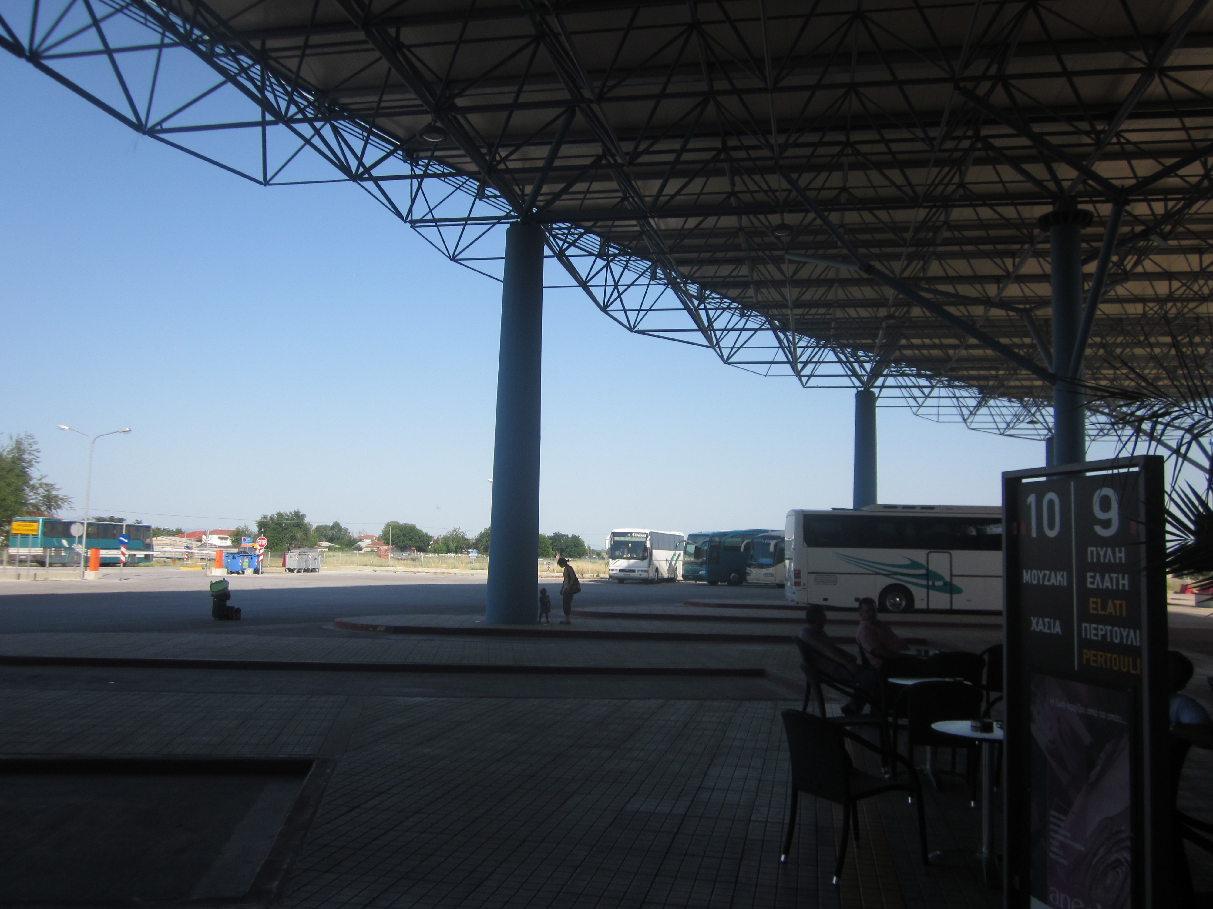 ギリシャ、トリカラバスターミナル